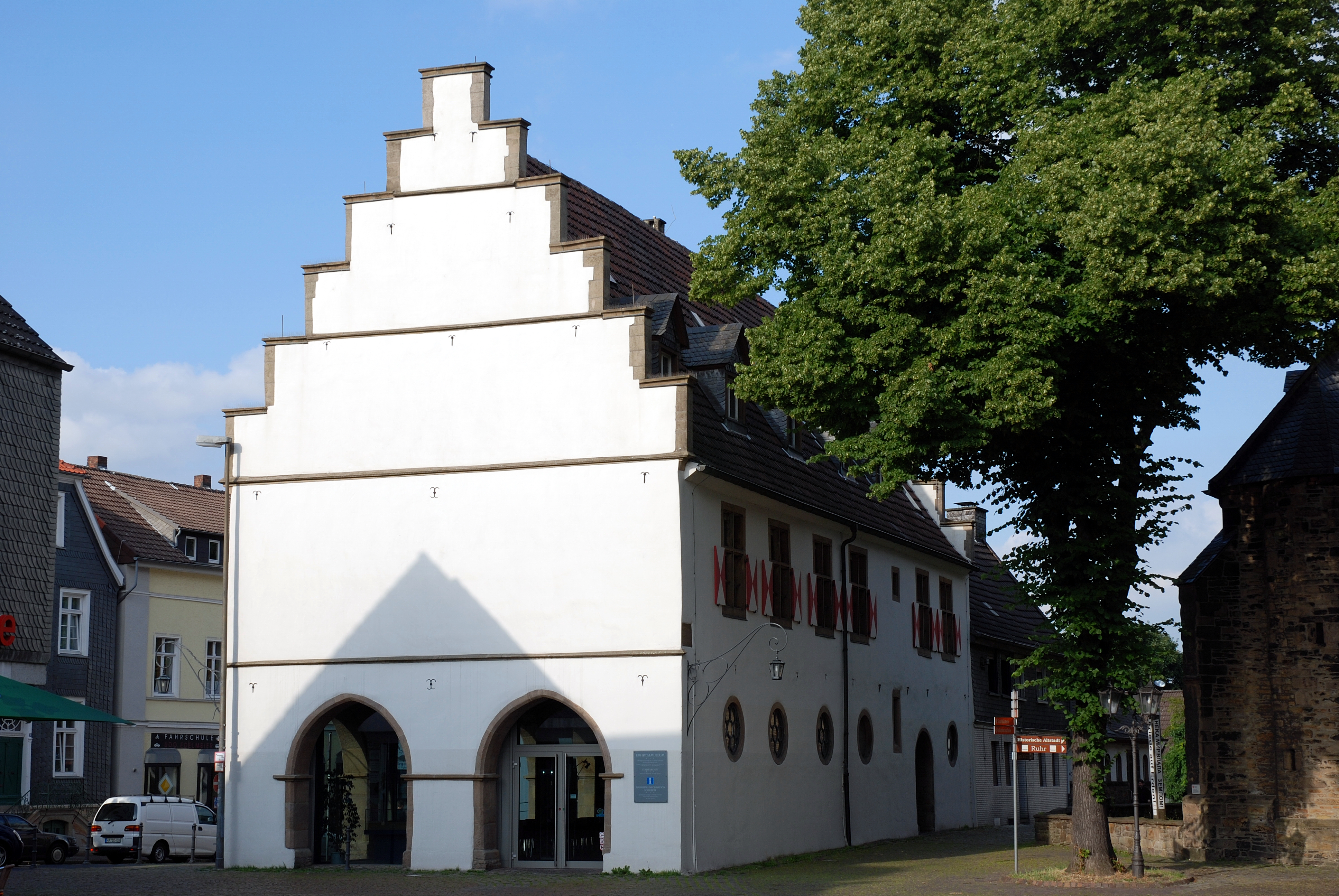 Schwerte, Altes Rathaus, heute Ruhrtalmuseum, Blick von Markt aus Richtung Westen